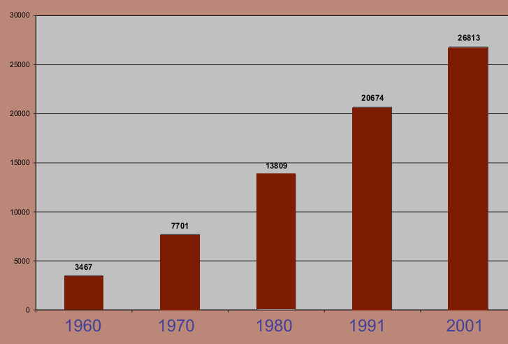 Crecimiento demografico - Rawson - Chubut - Argentina